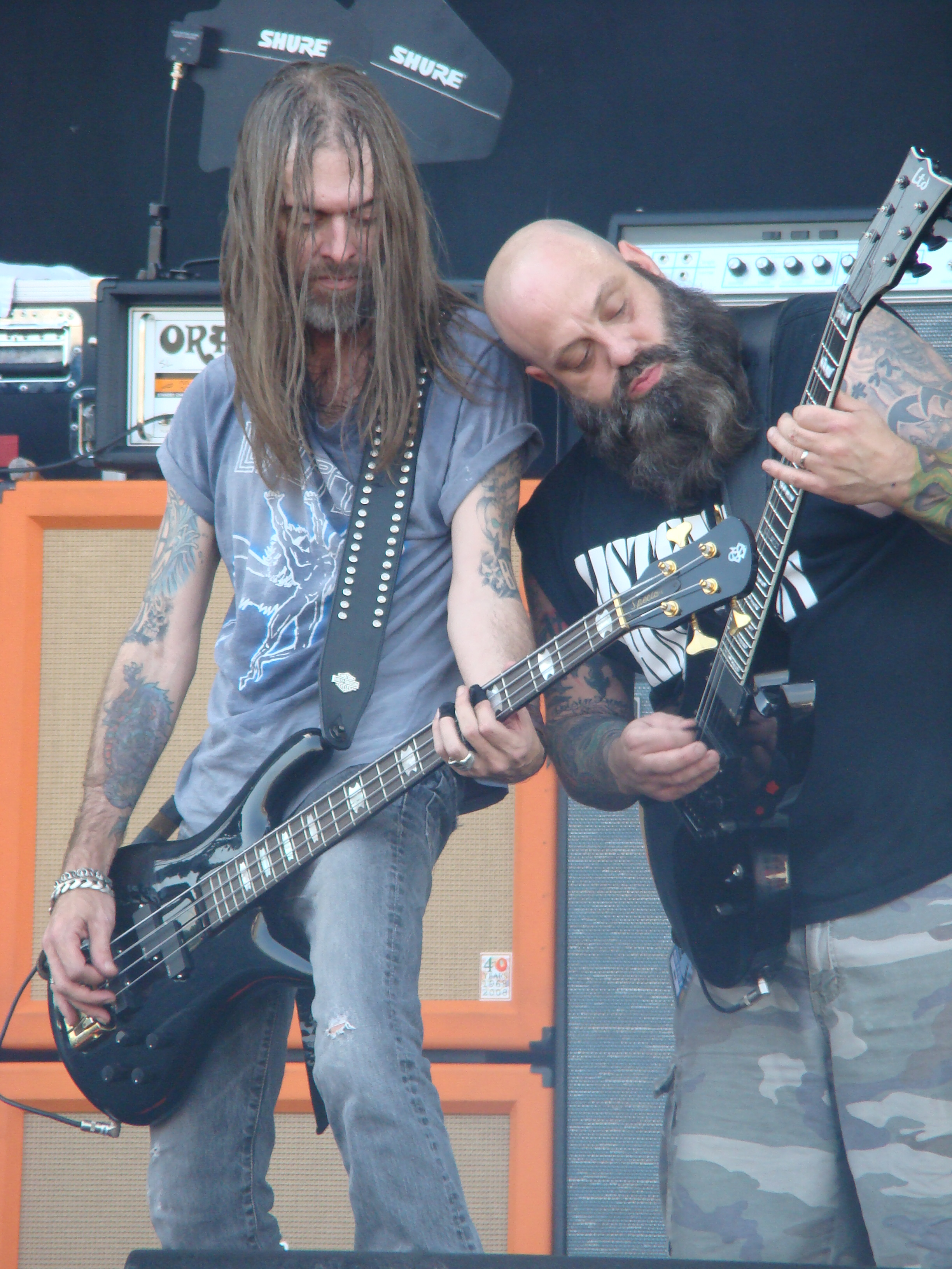 Down actuando en el festial Gods of Metal de 2009.